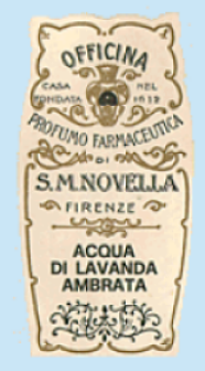 Imagen de la etiqueta del Acqua Di Lavanda fabricada en la Farmacia de Santa María Novella